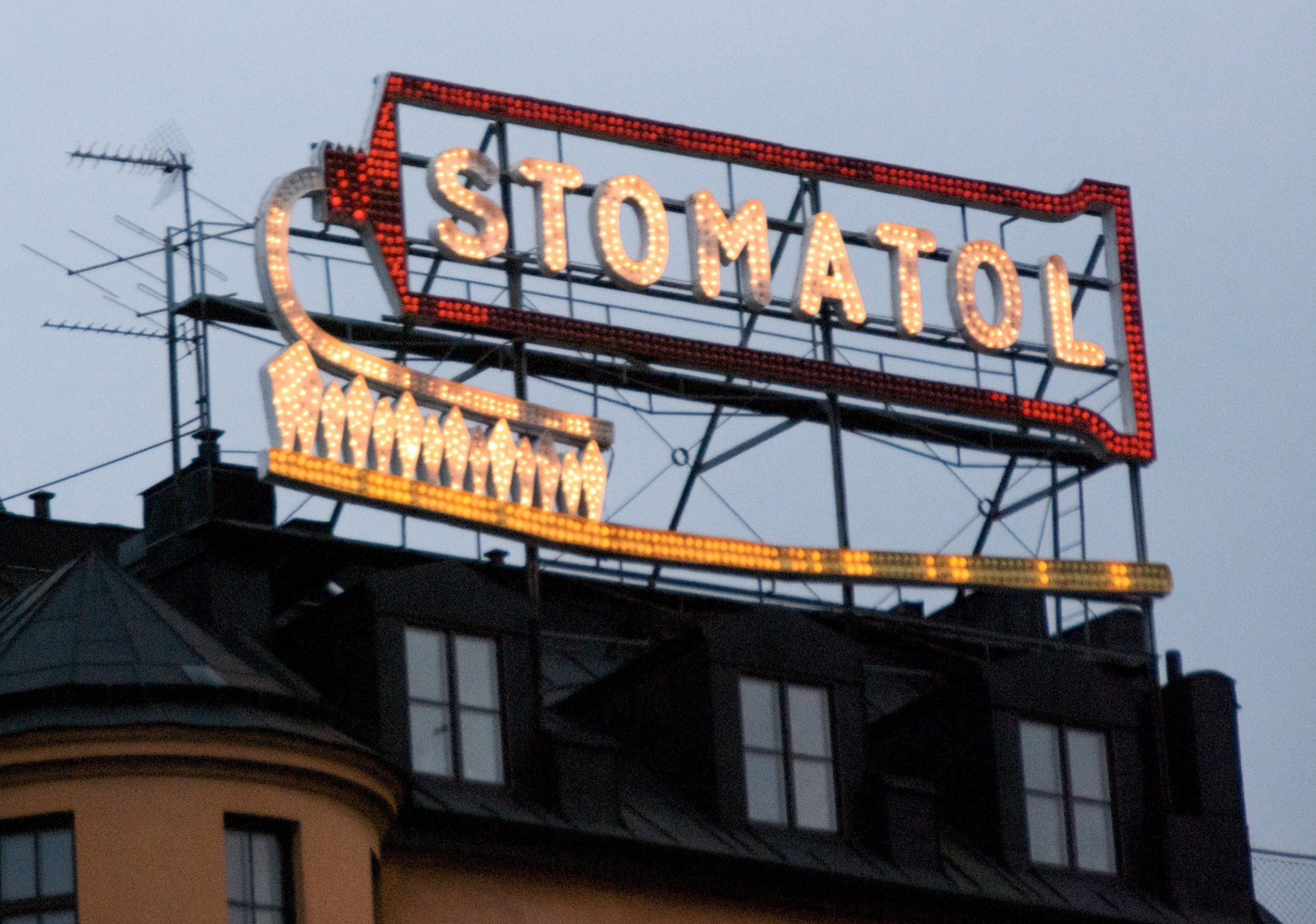 Stomatolskylten i skymningen